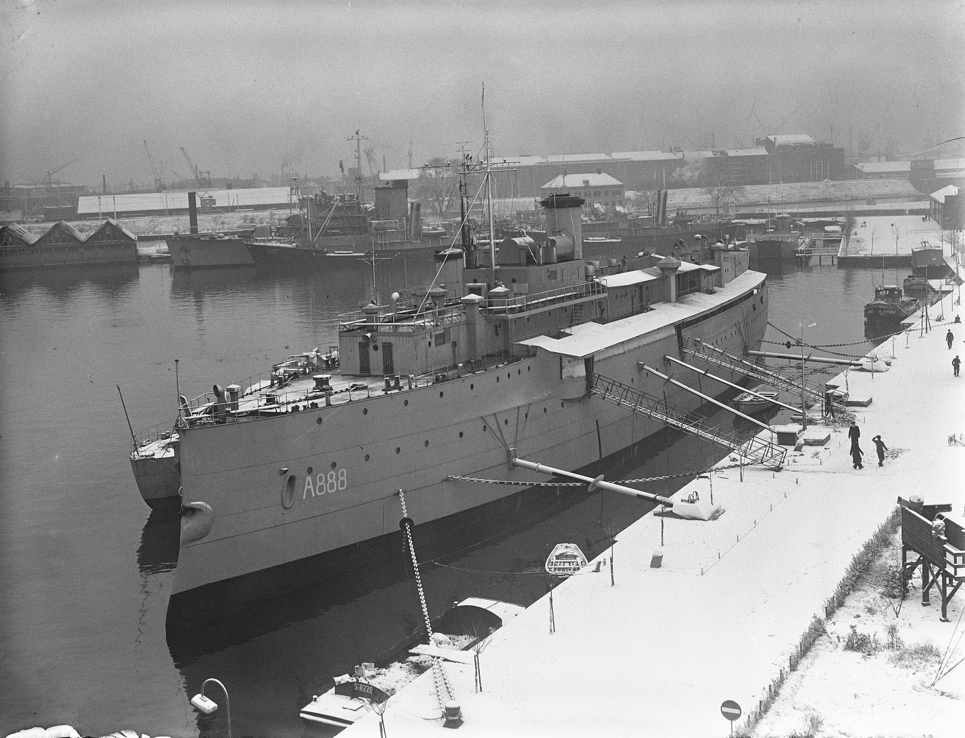 Collectie / Archief : Fotocollectie Anefo Reportage / Serie : [ onbekend ] Beschrijving : Wachtschip Hr.Ms 'Hertog Hendrik' (A888) aan de kade te Kattenburg Annotatie : Opdracht Koninklijke Marine Datum : 14 december 1950 Locatie : Amsterdam Trefwoorden : marine, militaire bases, militaire vaartuigen Fotograaf : Vogel, Carel L. de / Anefo Auteursrechthebbende : Nationaal Archief Materiaalsoort : Glasnegatief Nummer archiefinventaris : bekijk toegang 2.24.01.09 Bestanddeelnummer : 904-3416